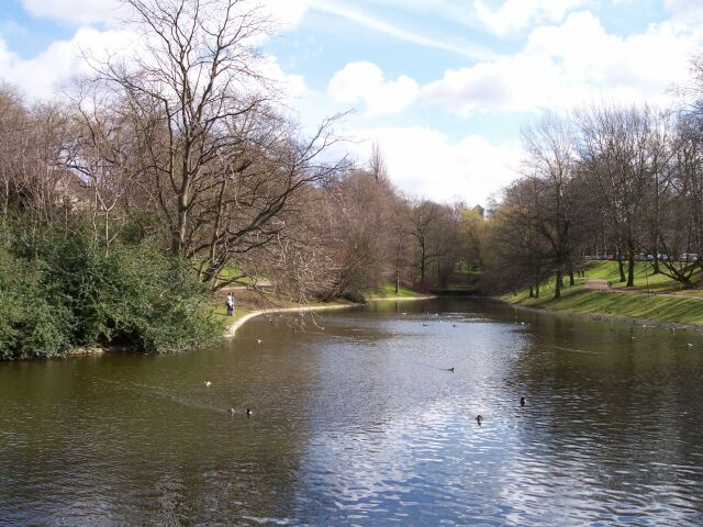 Bild aus Bochum, selbst aufgenommen, GFDL